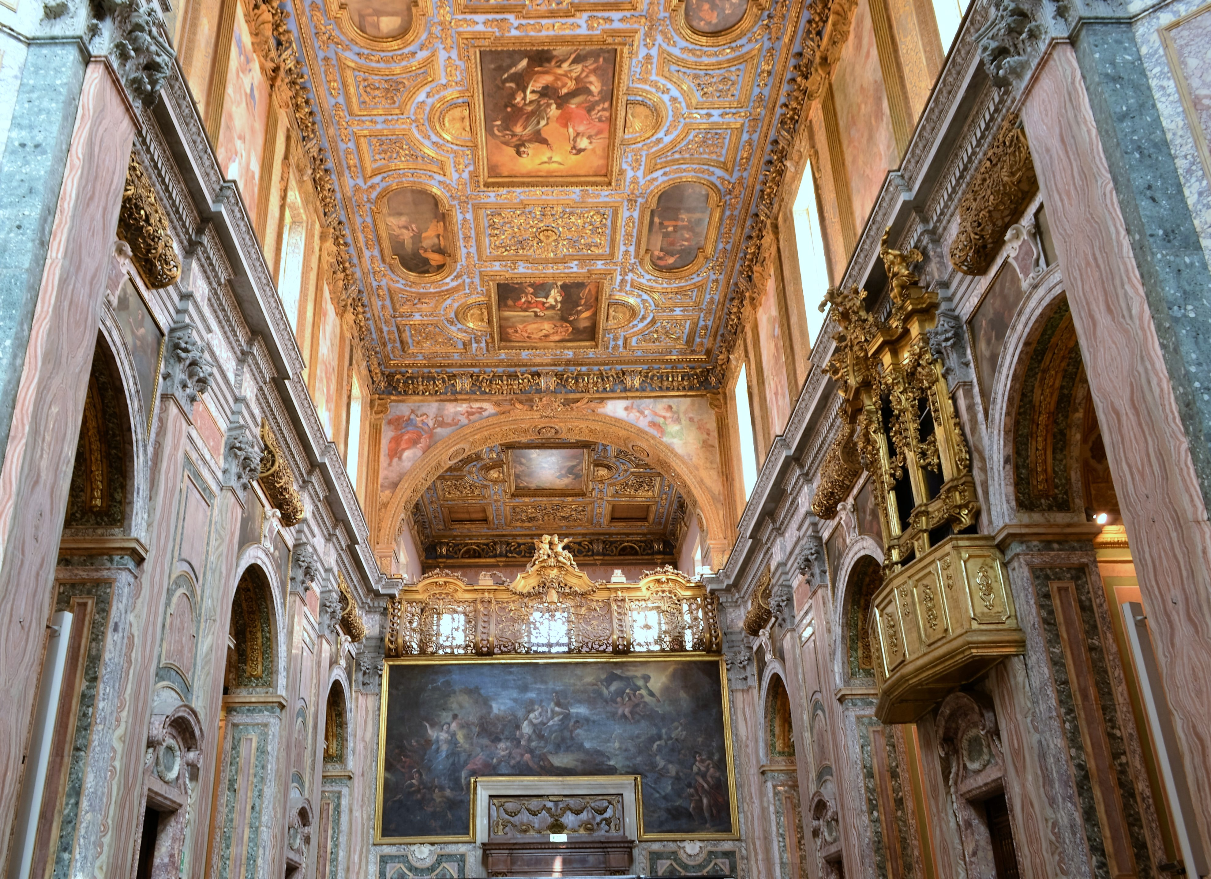 Chiesa dei Santi Marcellino e Festo di Napoli - Interno verso la controfacciata